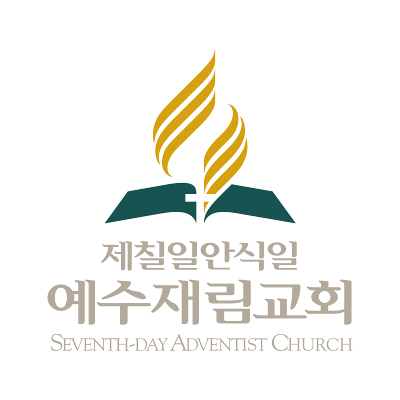 재림교회 로고